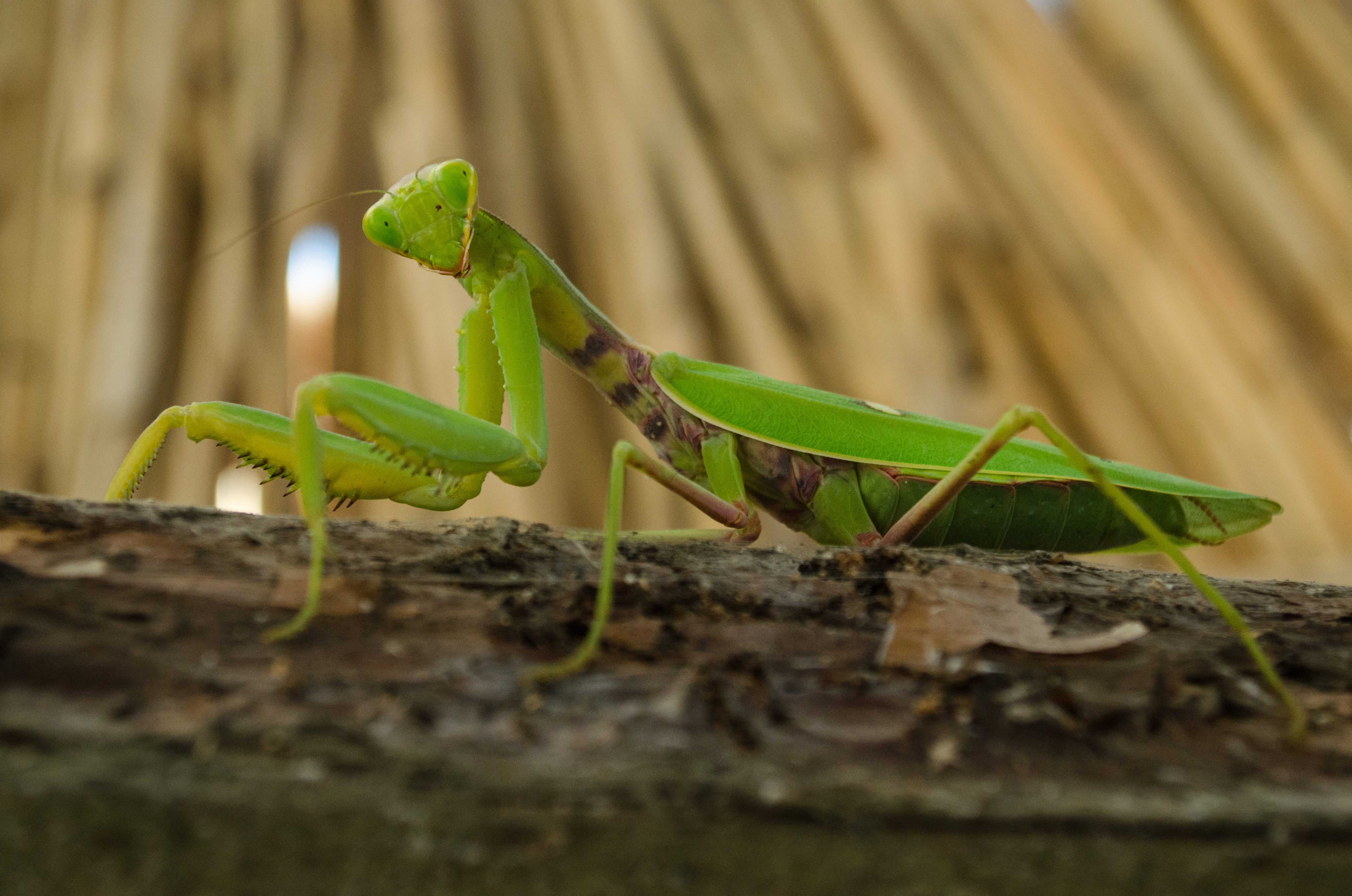 Джарилгацький, Скадовський район, Адміністрація створюється